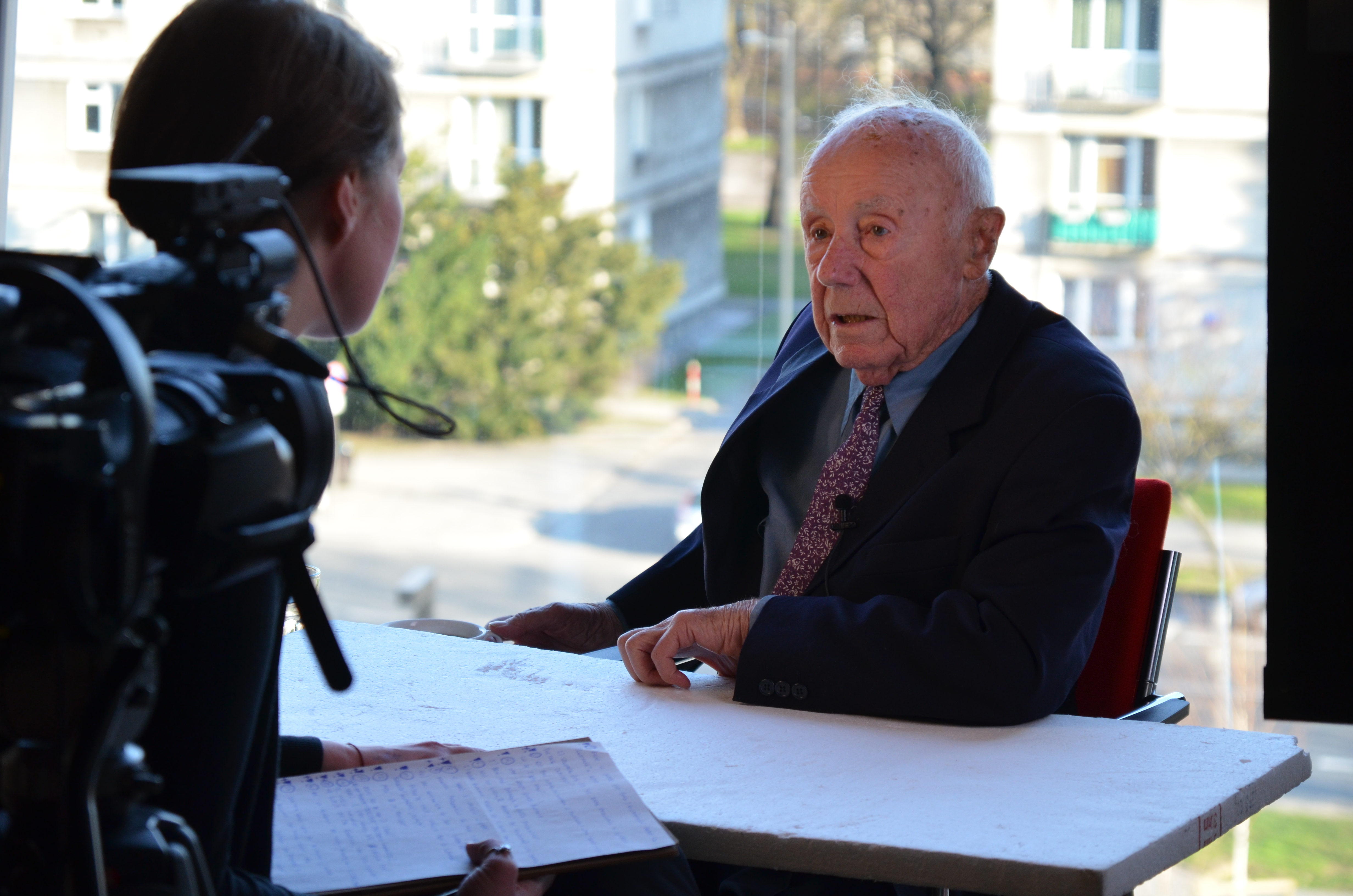 Symcha Rotem, ps. "Kazik" podczas udzielania wywiadu dla Muzeum Historii Żydów Polskich POLIN. Wywiad jest dostępny w kolekcji Muzeum POLIN.